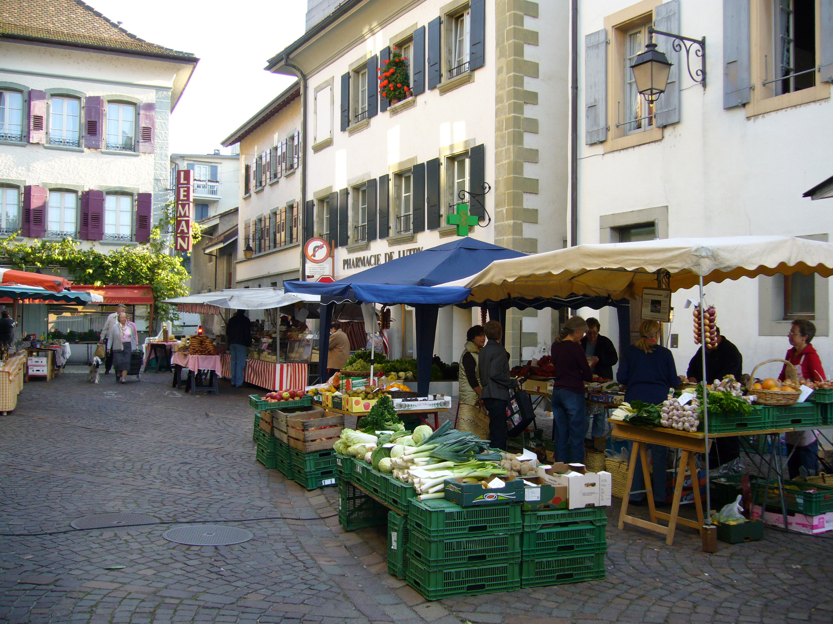 Samstagsmarkt in Lutry, Kanton Waadt